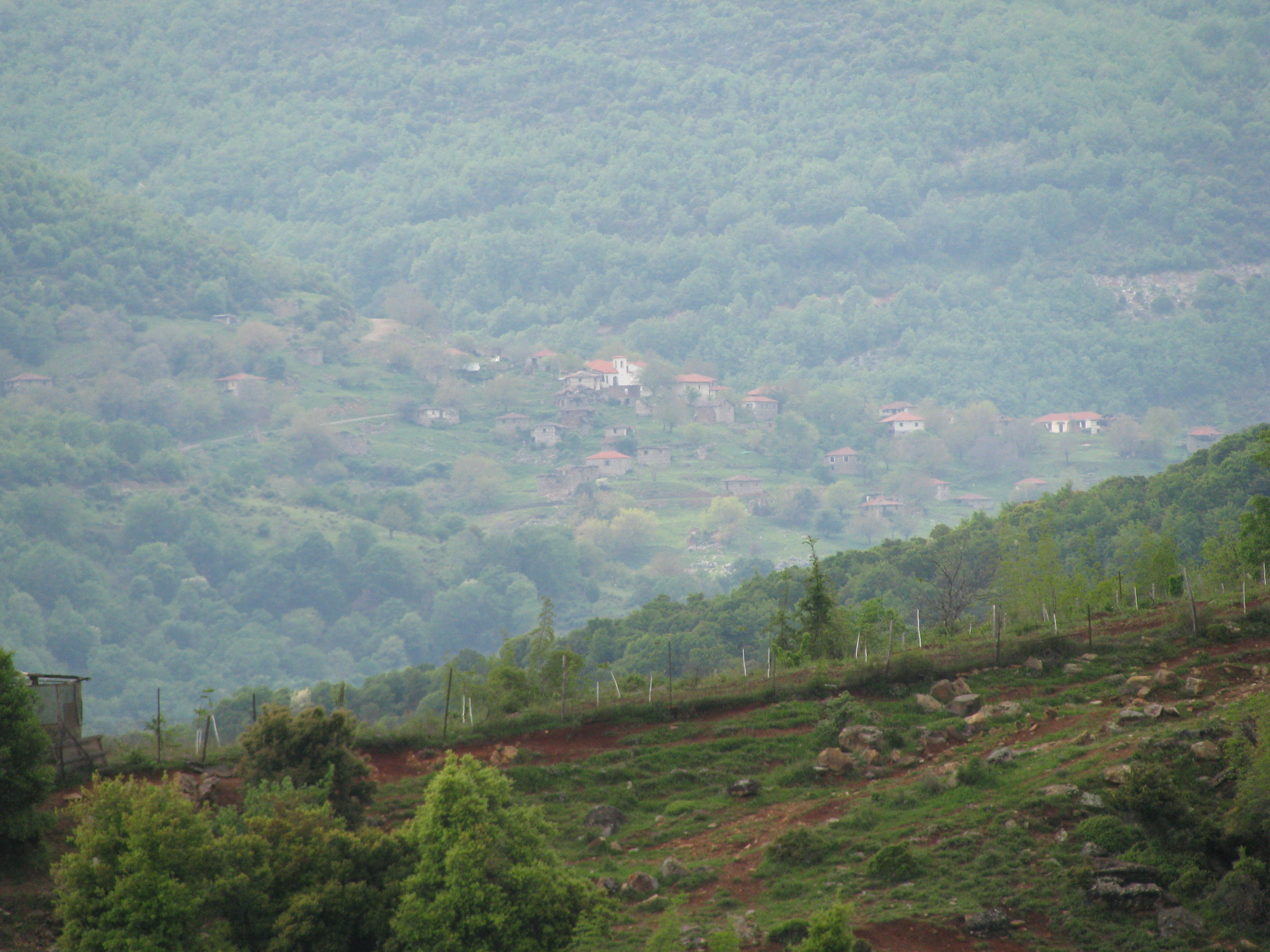 Село Корнишор, Воденско, Гърция.